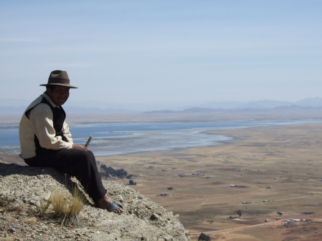 Die Halbinsel von Capachica